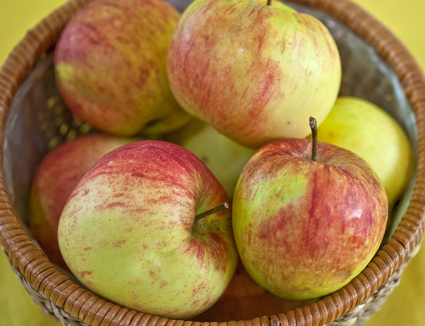 Der James Grieve ist eine Apfelsorte